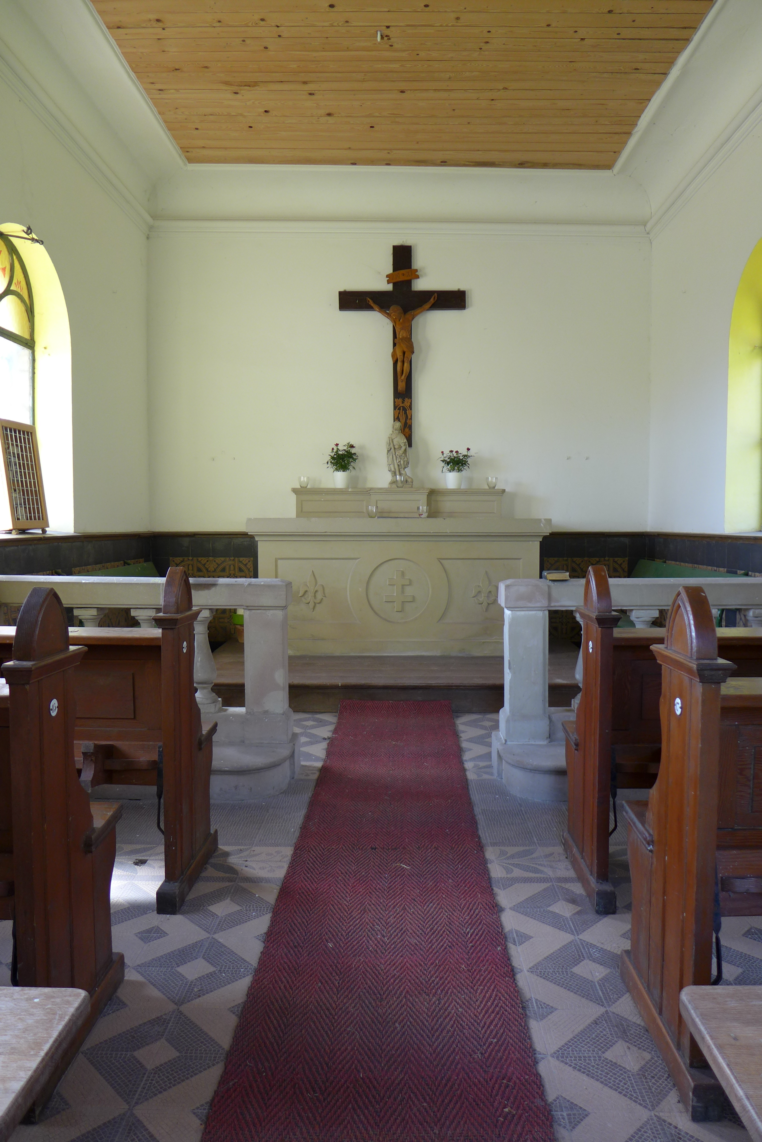 Wallerfangen, Limberg, Blick ins Innere der Wallfahrtskapelle